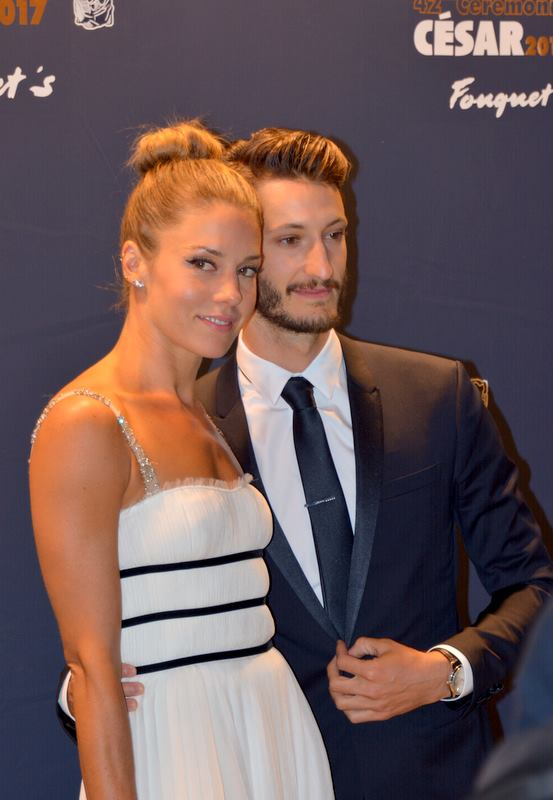 Pierre Niney à la cérémonie des César